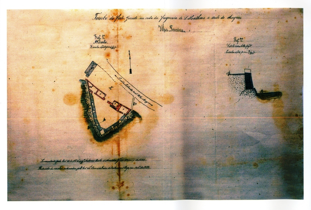 "Tombo do Forte Grande na costa da freguesia de S. Matheus, a Oeste de Angra", Ilha Terceira (Açores), Portugal.